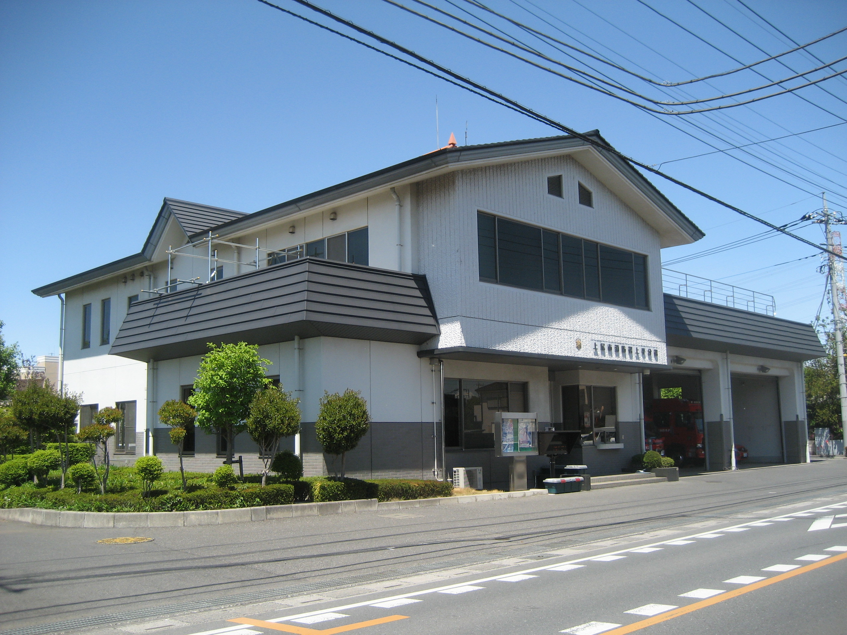 上尾市消防本部東消防署上平分署